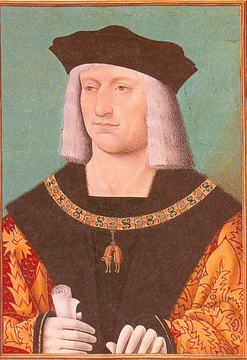 Porträt aus dem Statutenbuch des Ordens vom Goldenen Vlies